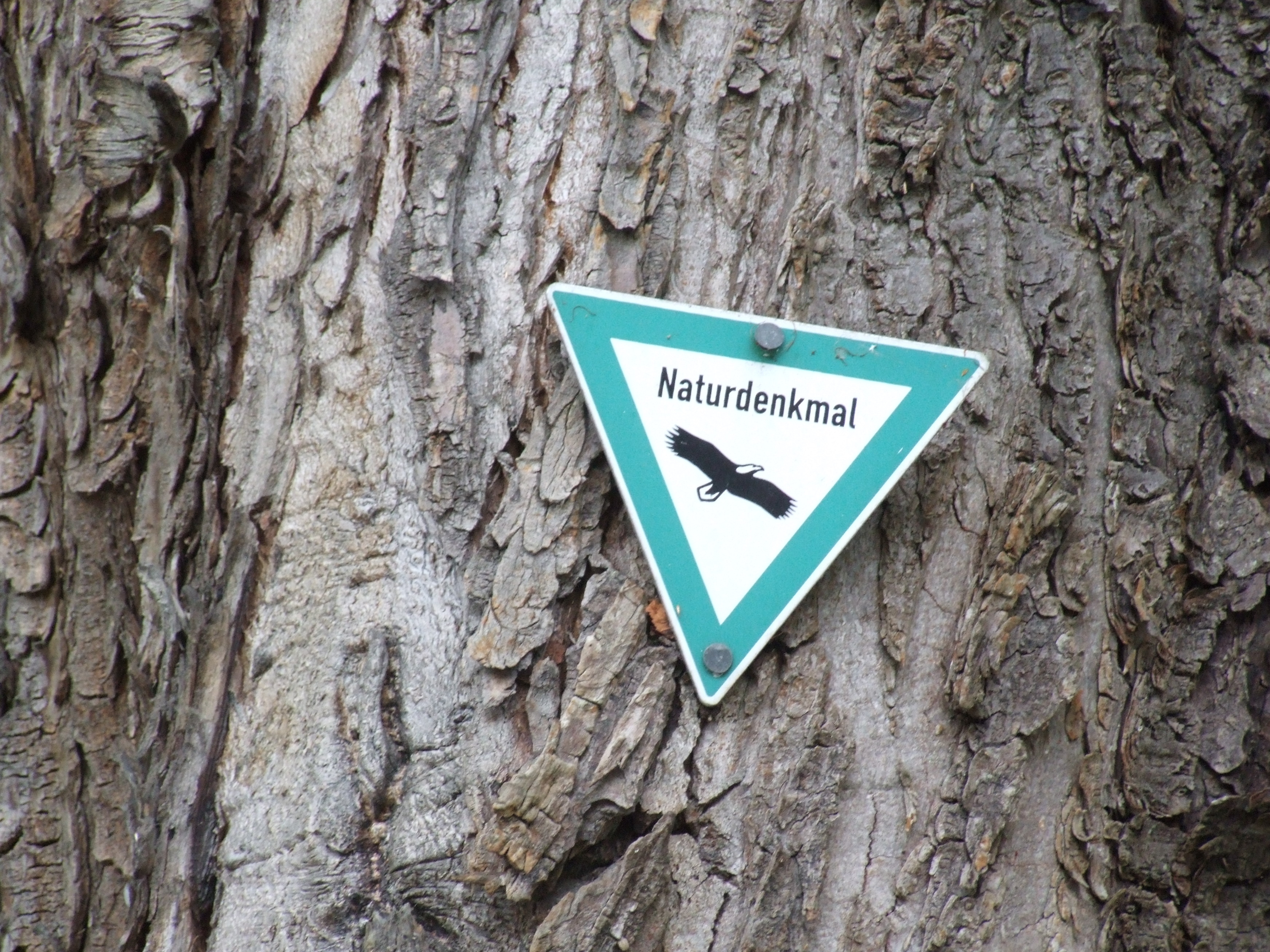 Eine Reihe als Naturdenkmal ausgewiesener Kastanien in Eschelbronn, die sogenannte „Kastanienallee“ in der Bahnhofstraße.